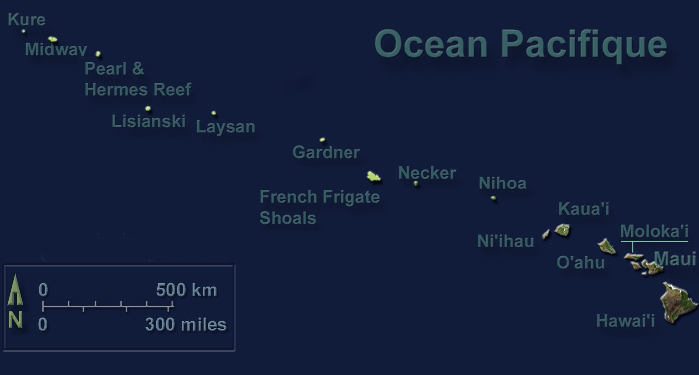 carte de l'archipel d'Hawaï